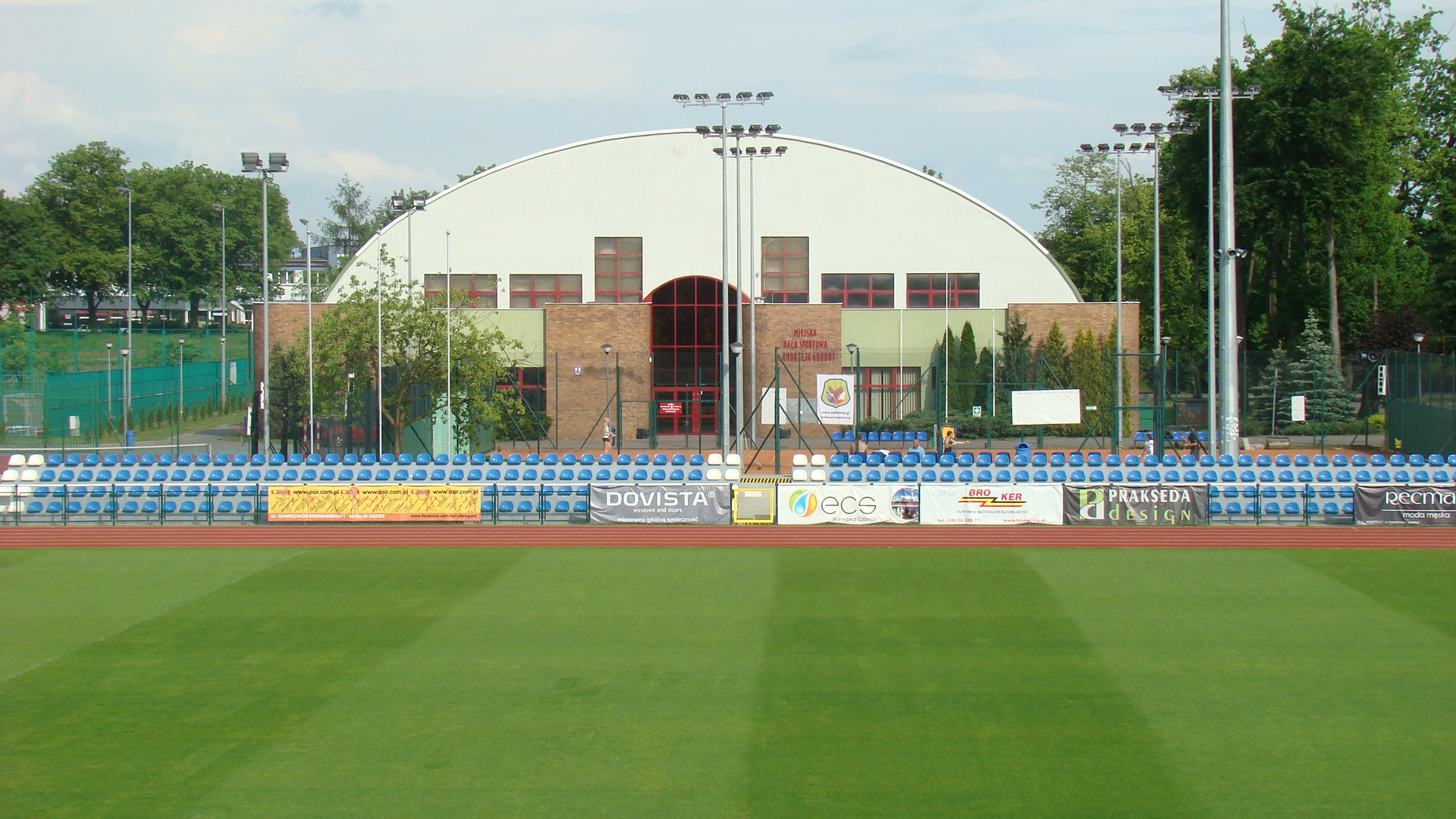 Ośrodek Sportu i Rekreacji w Starogardzie położony przy ul. Olimpijczyków Starogardzkich 1.